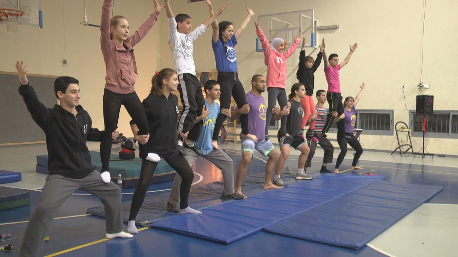 קרקס ללא גבולות